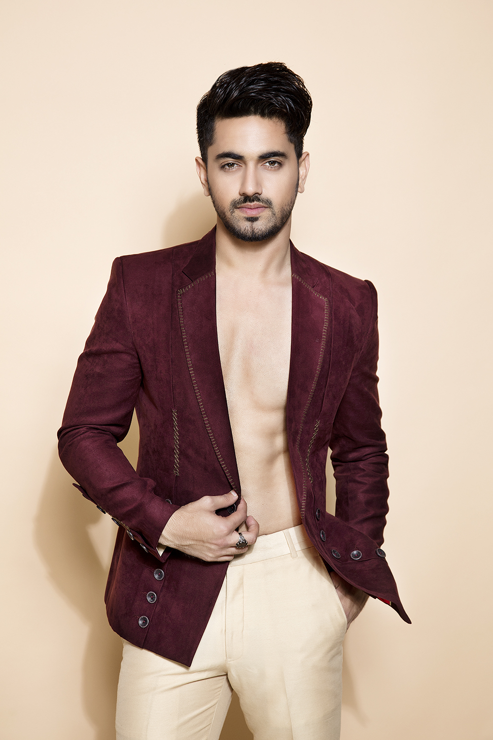 SAJID-SHAHID-CLICKED-ZAIN-IMAM